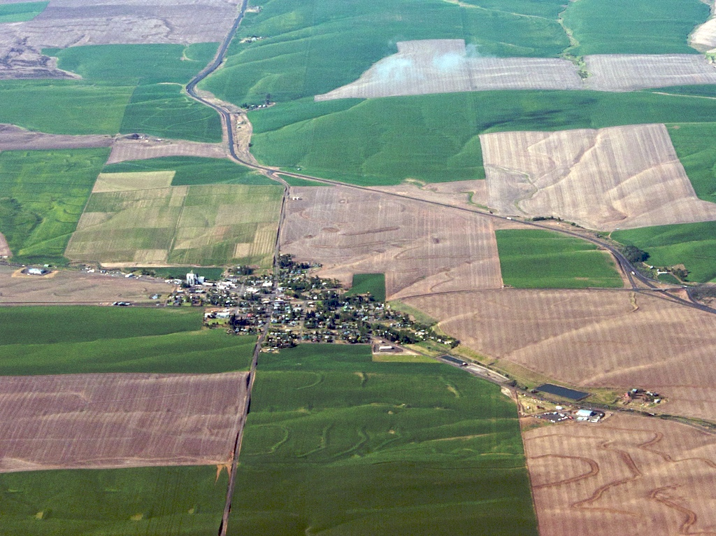 Wasco, Oregon